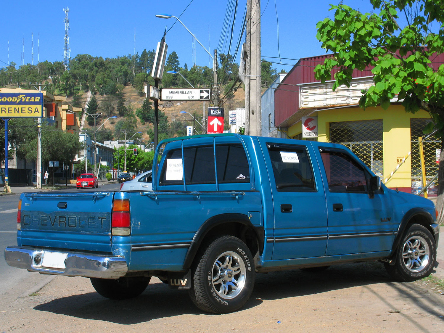 luv 1994